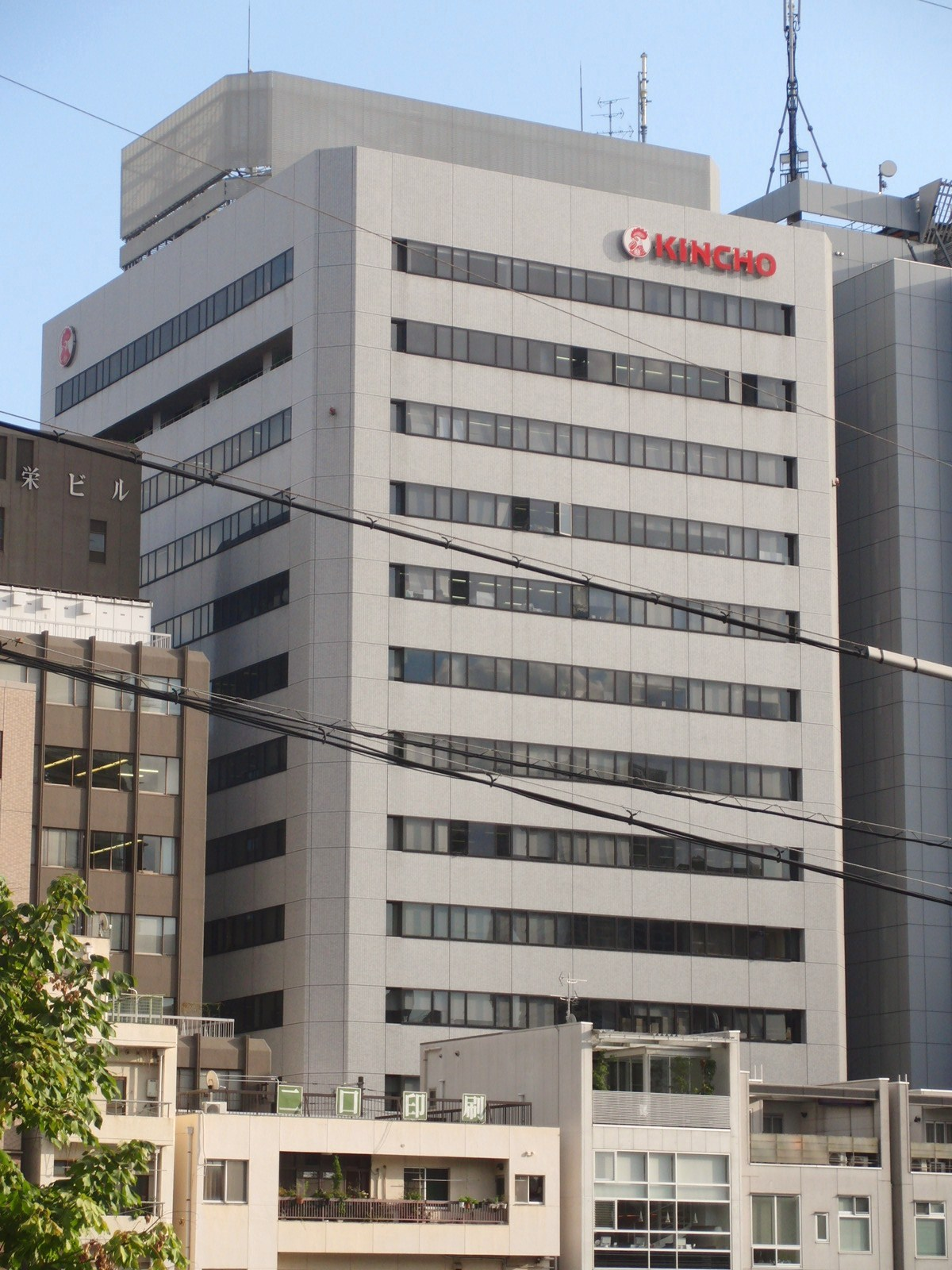 大日本除虫菊本社を撮影